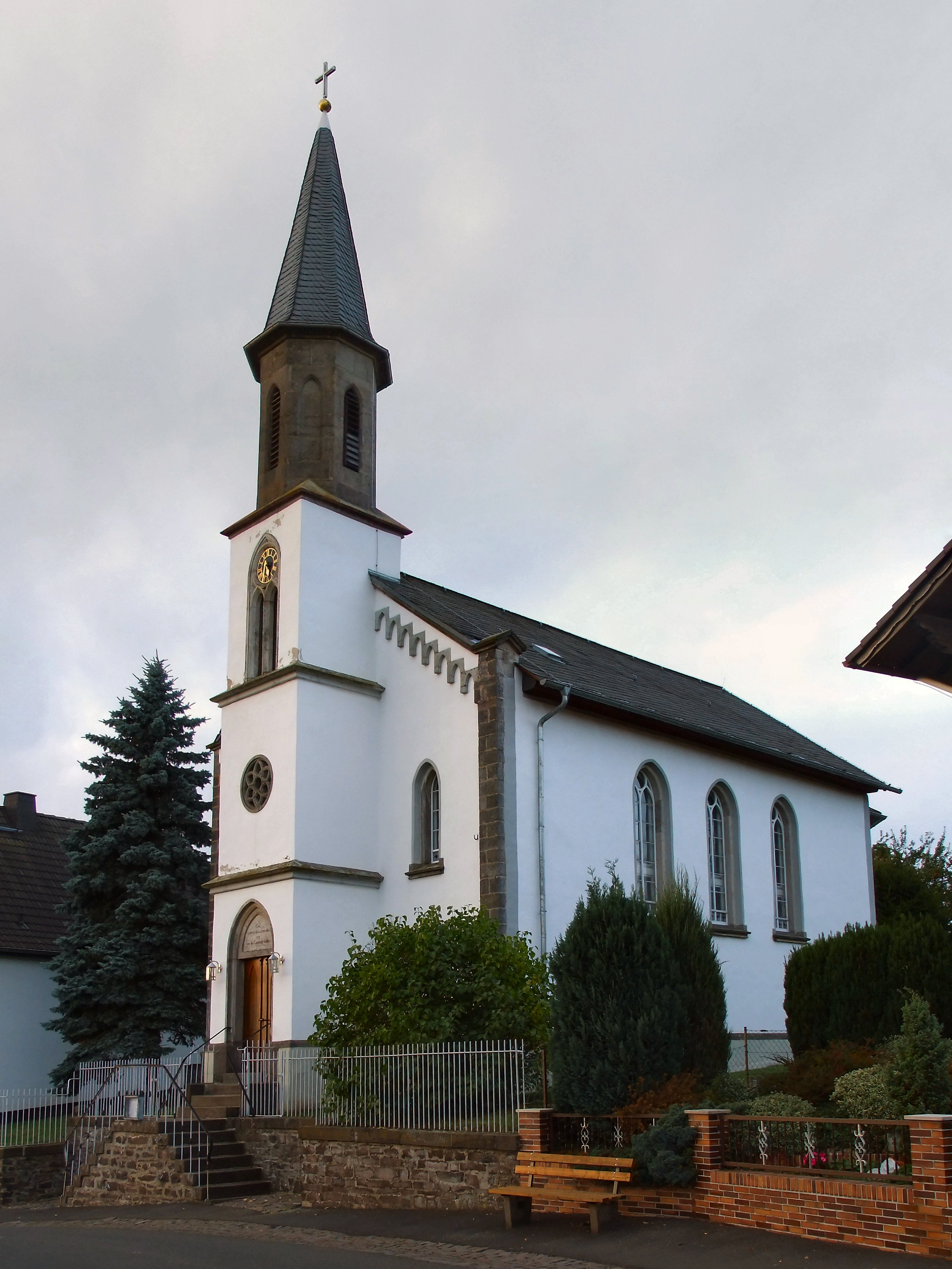 Evangelische Kirche in Röthges, Laubach, Landkreis Gießen, Hessen, Deutschland